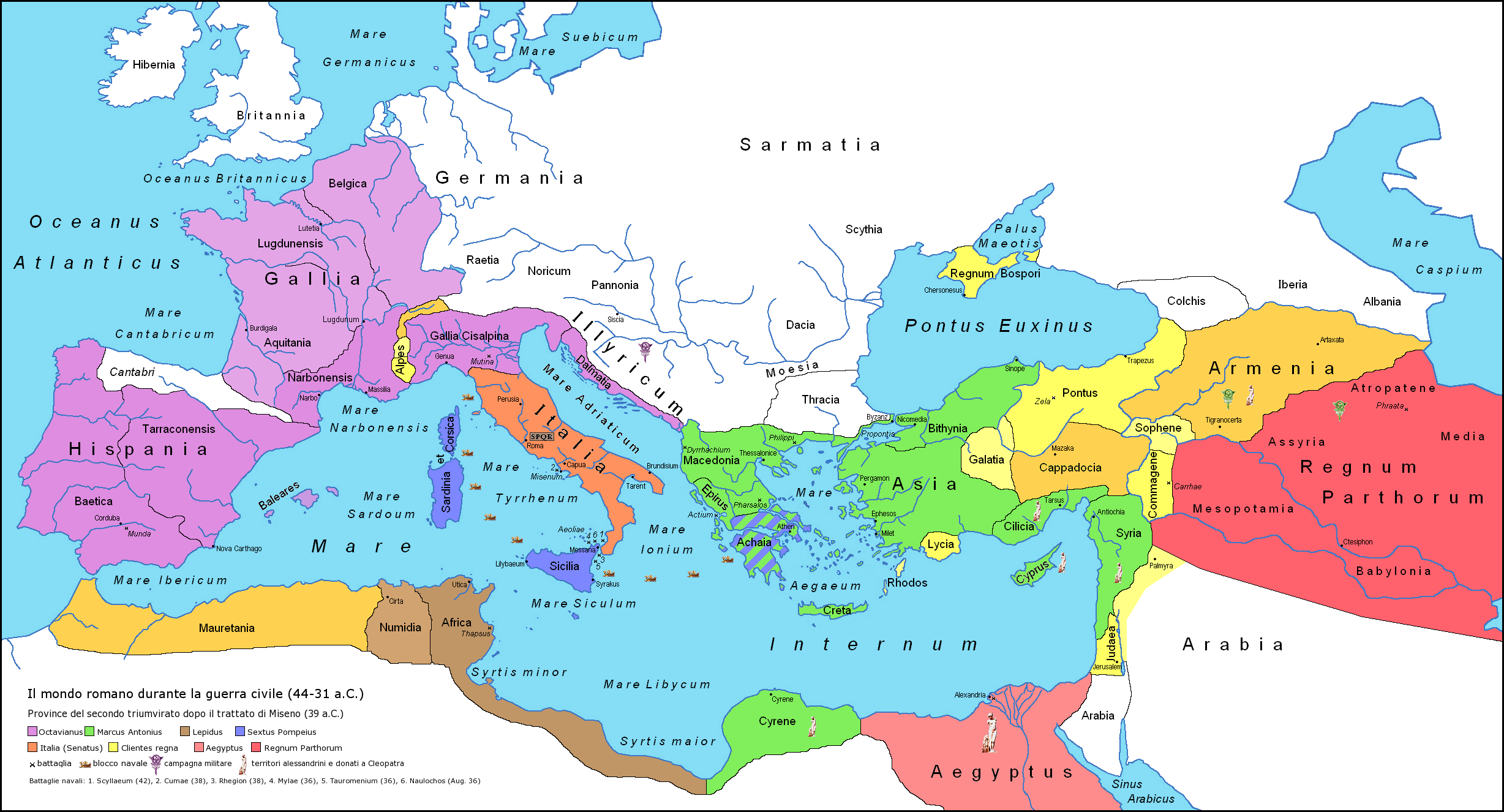 Karte des Römischen Reiches nach dem Vertrag von Misenum 39 v. Chr.